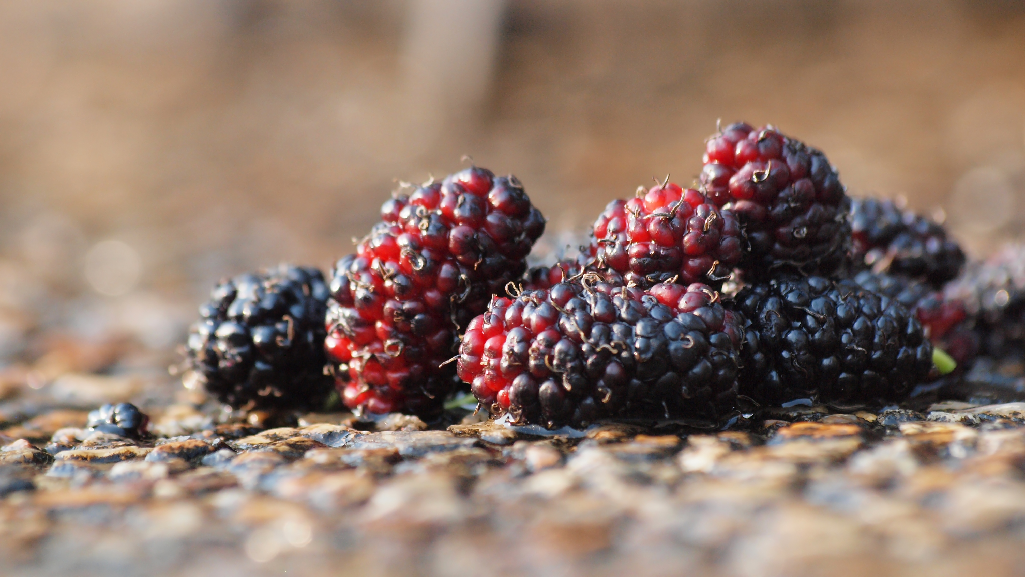 Mullberry